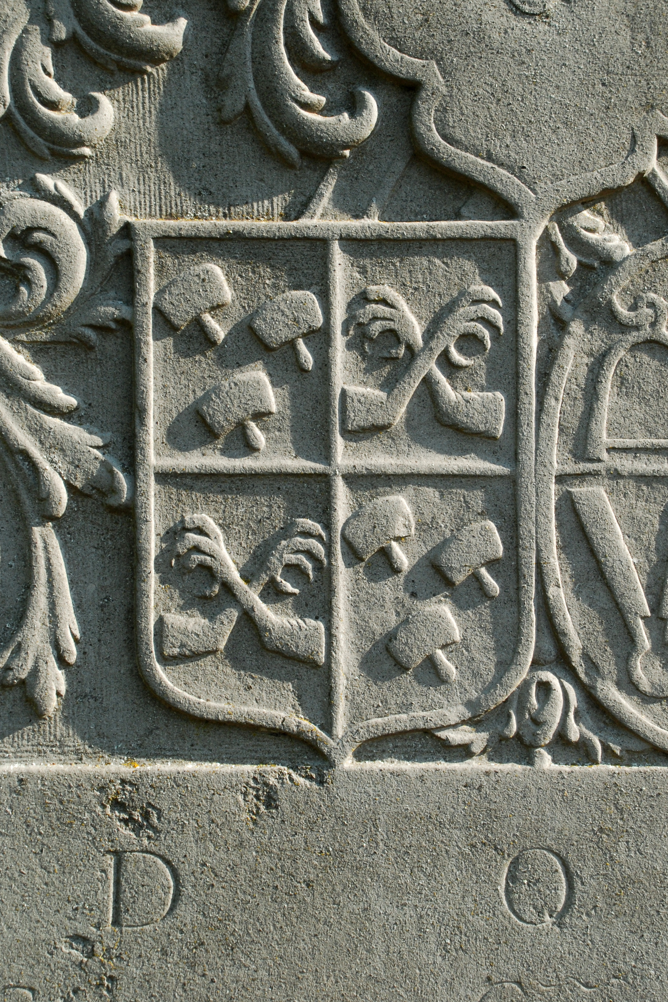 Belgique - Brabant wallon - Mont-Saint-Guibert - Église Saint-Pierre de Corbais - Dalle funéraire de Pierre de Pinchart